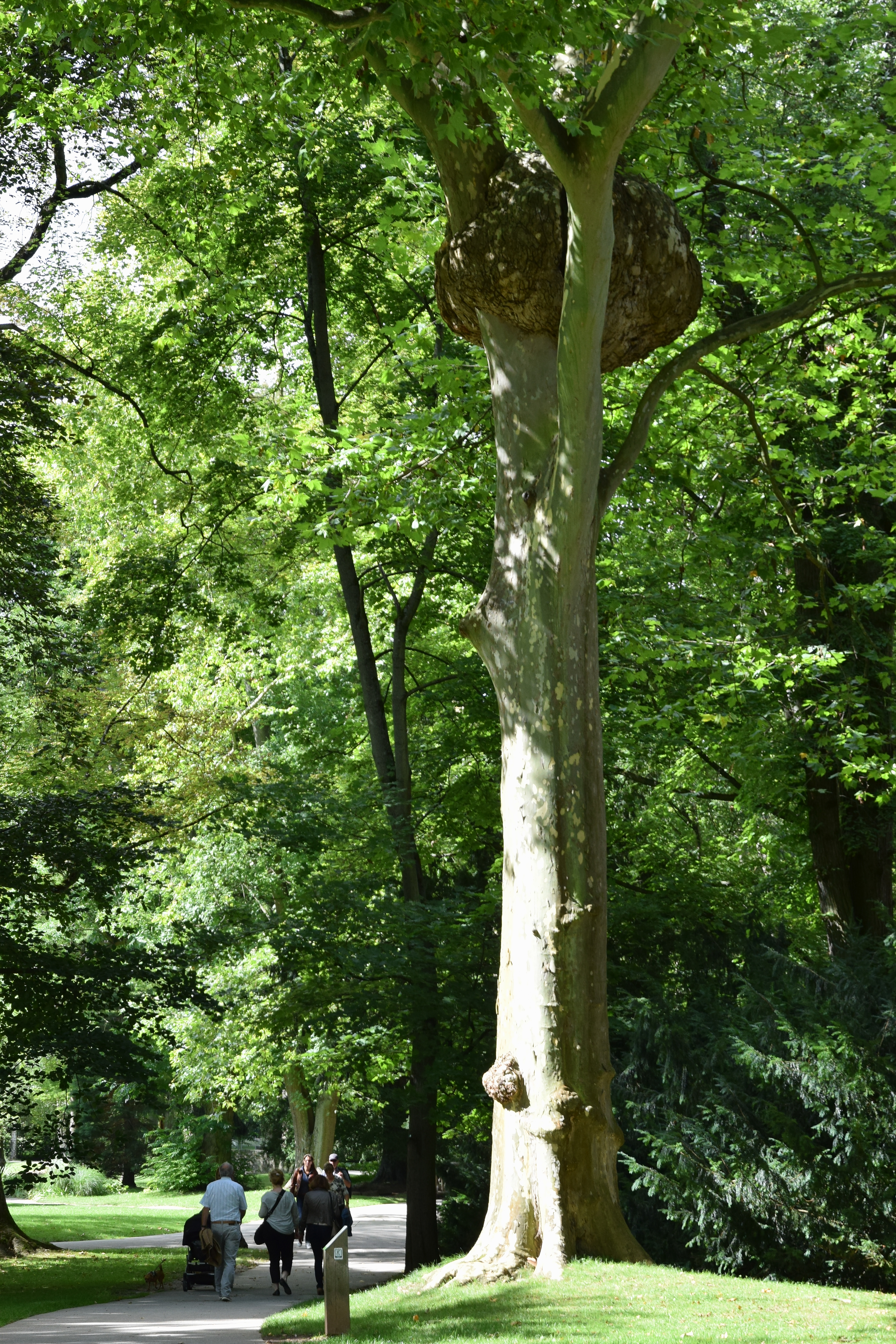 Ahornblättrige Platane (Platanus × hispanica) mit gutartigem, undifferenzierten Zellwachstum am Kronenansatz im Kurpark von Bad Nauheim